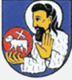 Blazono de Malnov-Sankt-Johano ([alamana lingvo